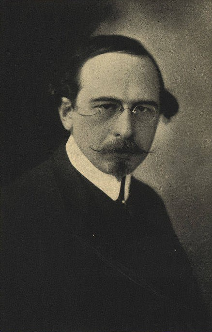 Heniot Levy vers 1920